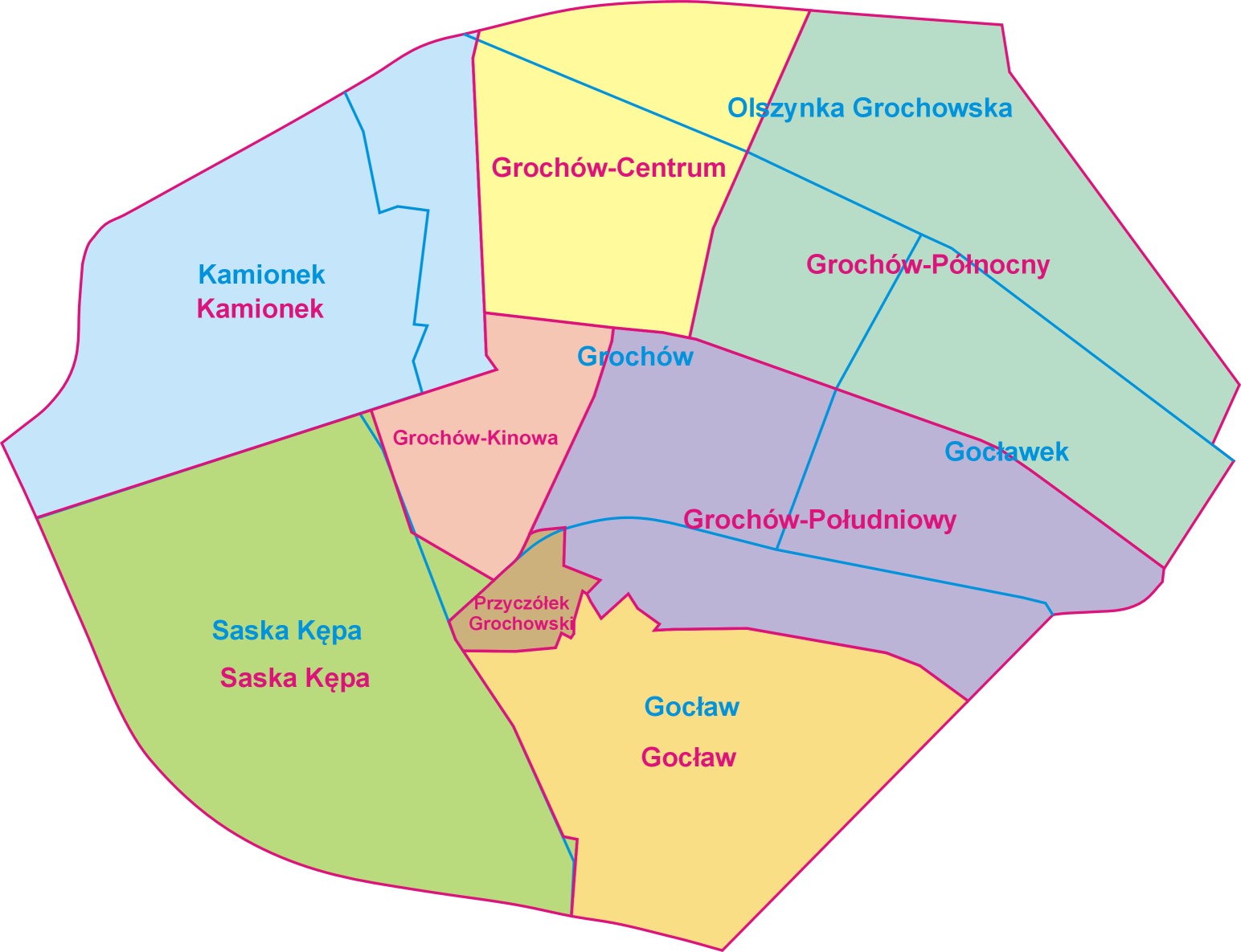 Mapa Pragi Południe z podziałem na osiedla (jednostki pomocnicze niższego rzędu) zgodnie z Uchwałą Nr 328/LI/2010 Rady Dzielnicy Praga Południe m. st. Warszawy z dnia 19 kwietnia 2010 r. oraz z zaznaczonymi granicami obszarów Miejskiego Systemu Informacji